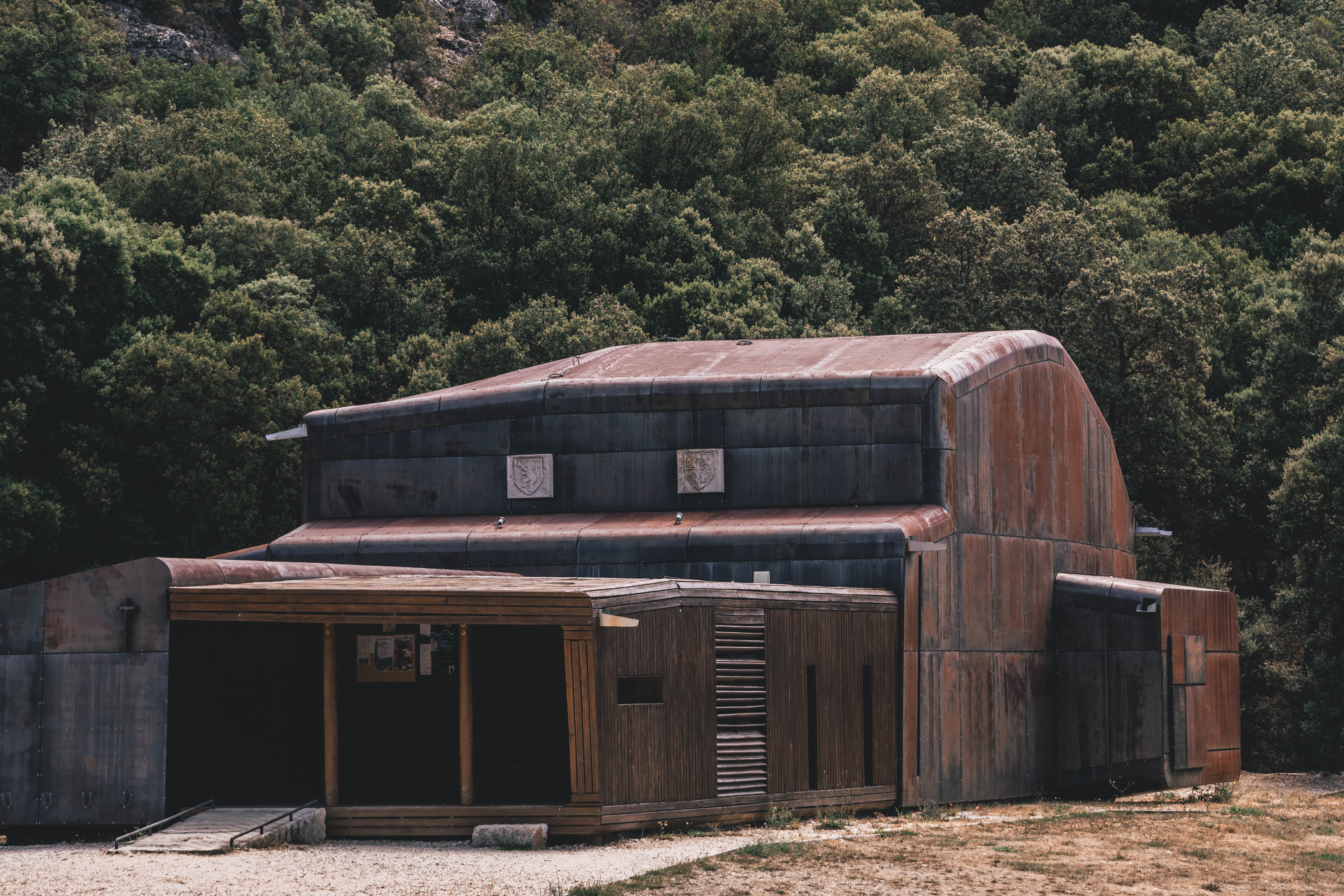 Capilla de madera y negro acero.